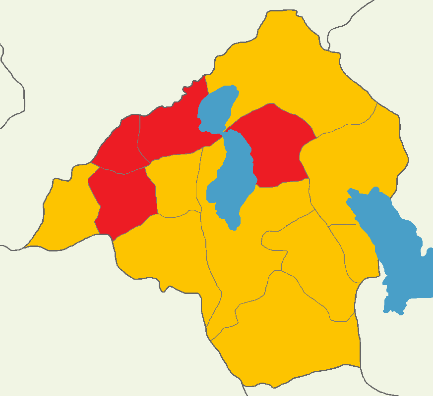 Isparta'da 2014 Türkiye cumhurbaşkanlığı seçimi sonuçları